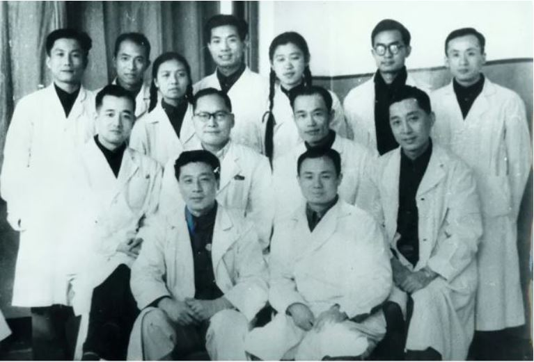 1954年，金显宅受中国卫生部委托开办第一届全国肿瘤临床医师进修班。